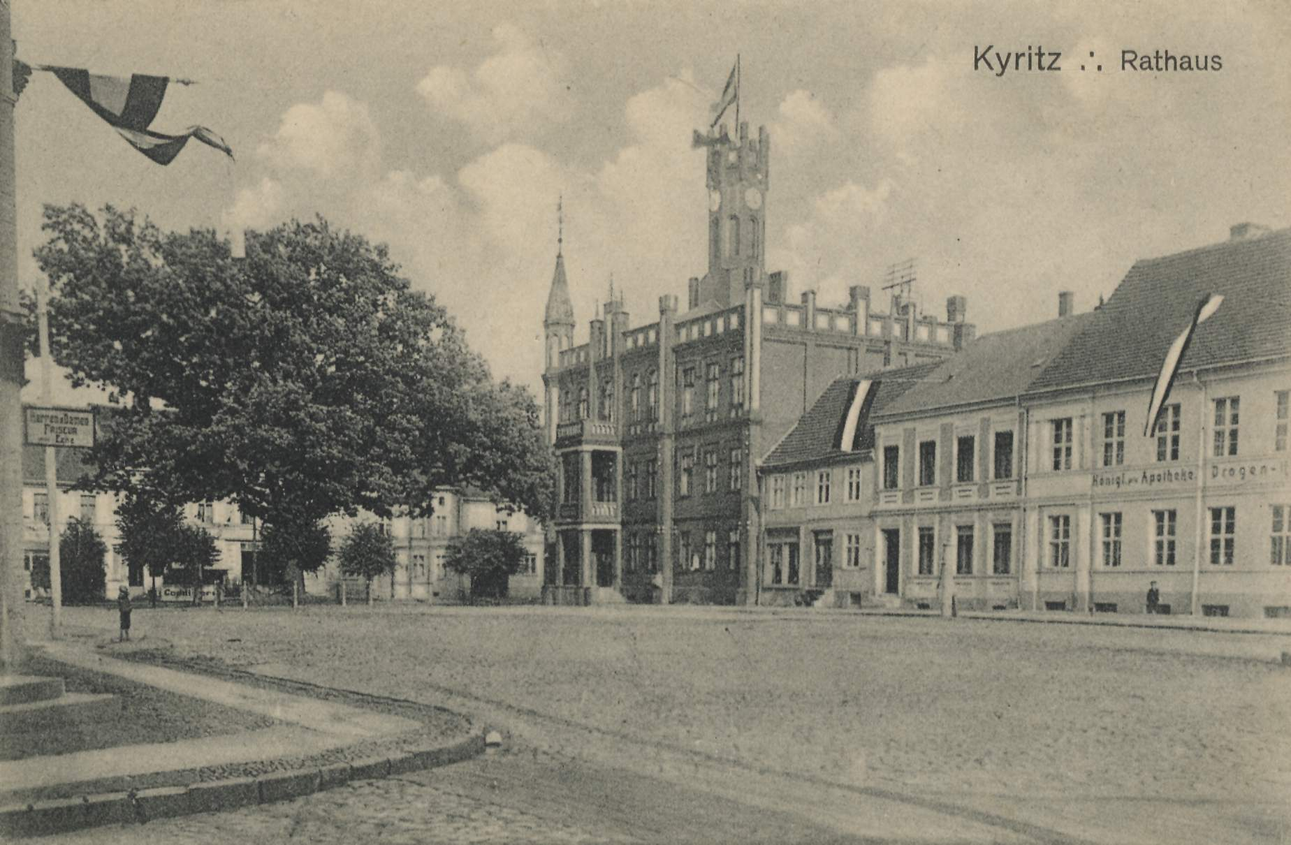 Rathaus